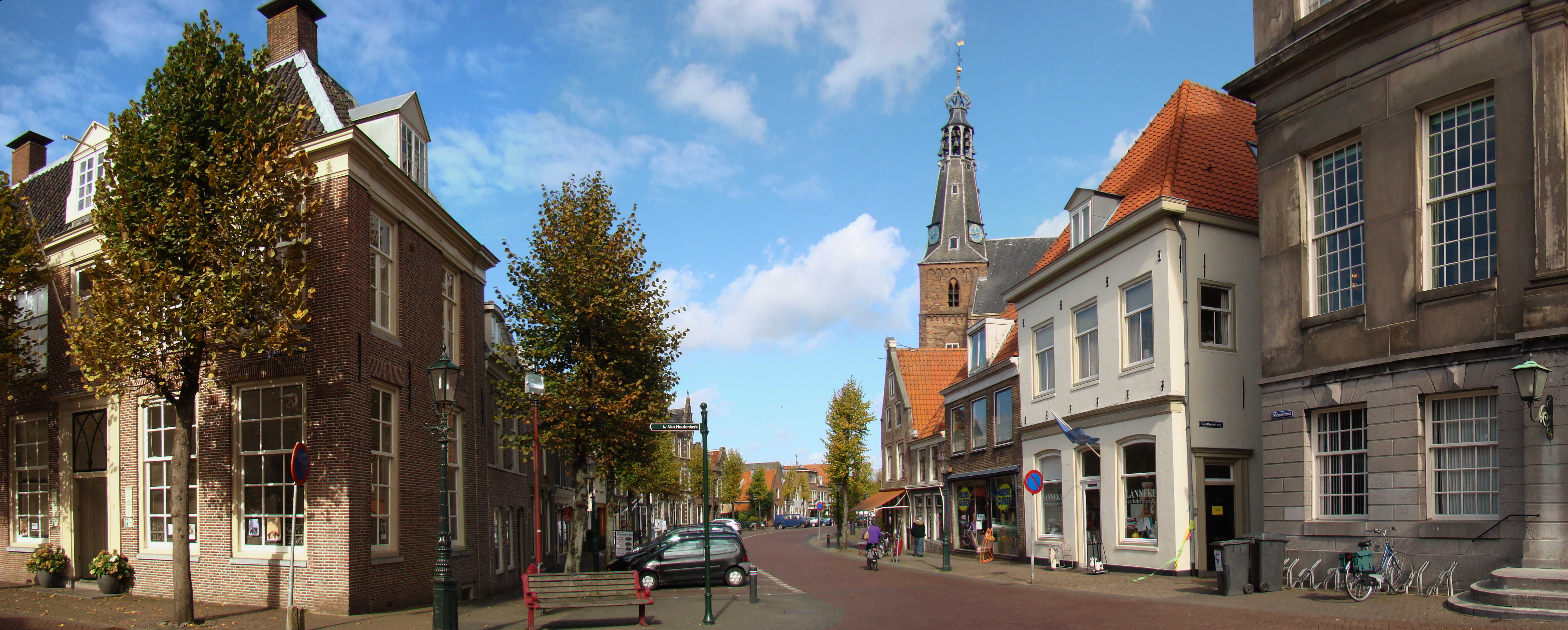 Nieuwstraat in Weesp